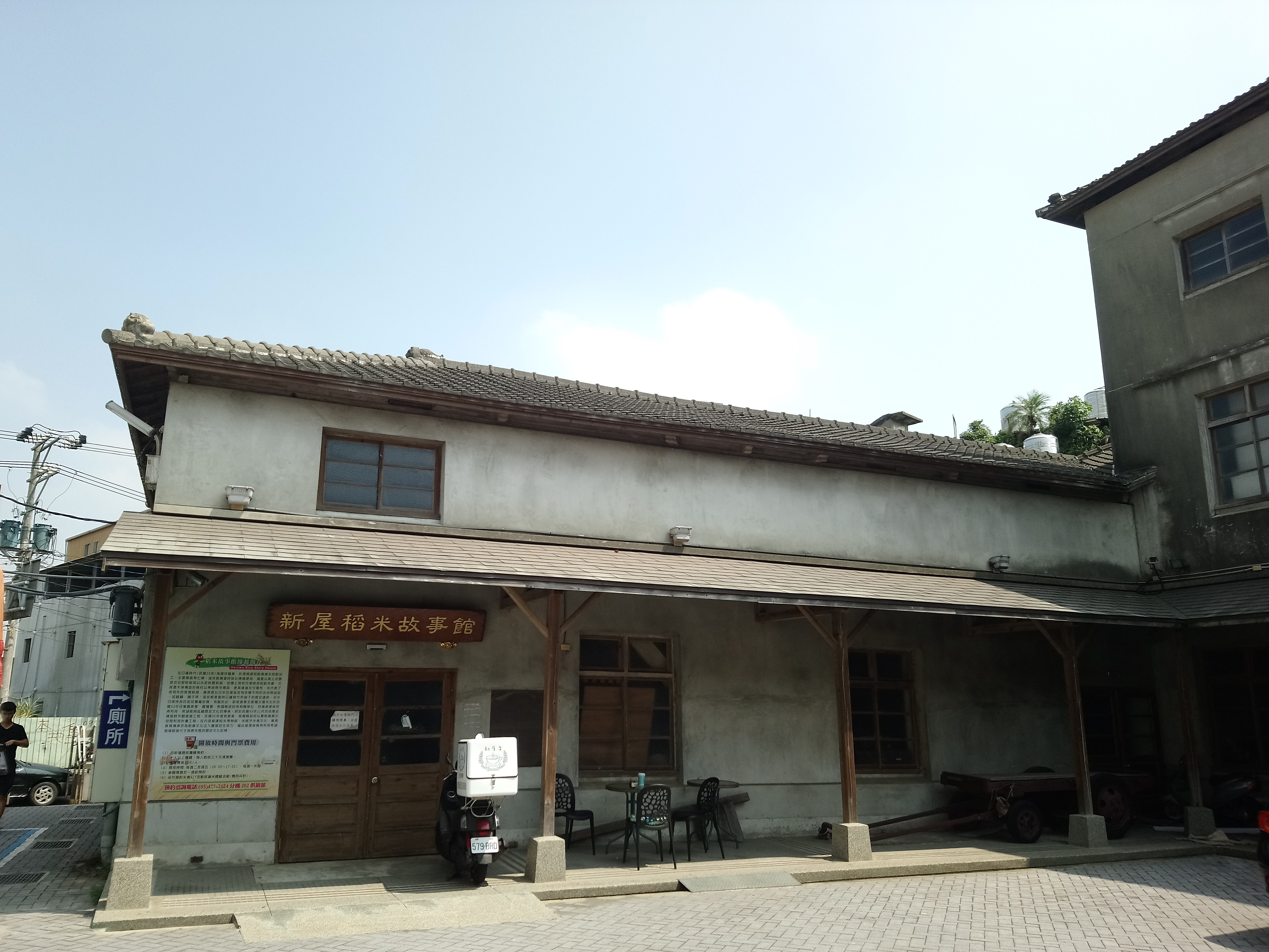 新屋稻米故事館,桃園市新屋區新屋次分區新屋里